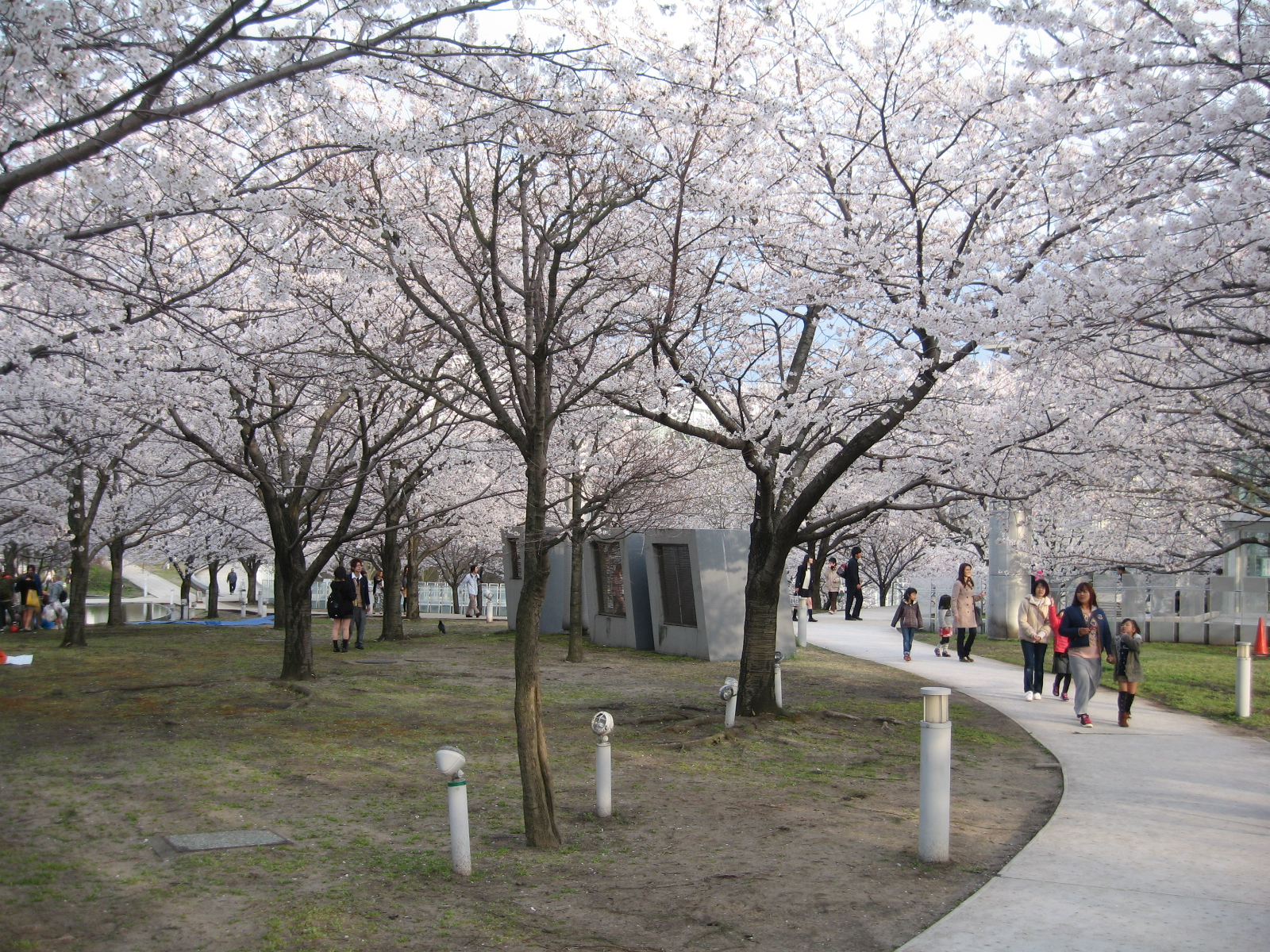 白山公園、空中庭園に咲く桜。